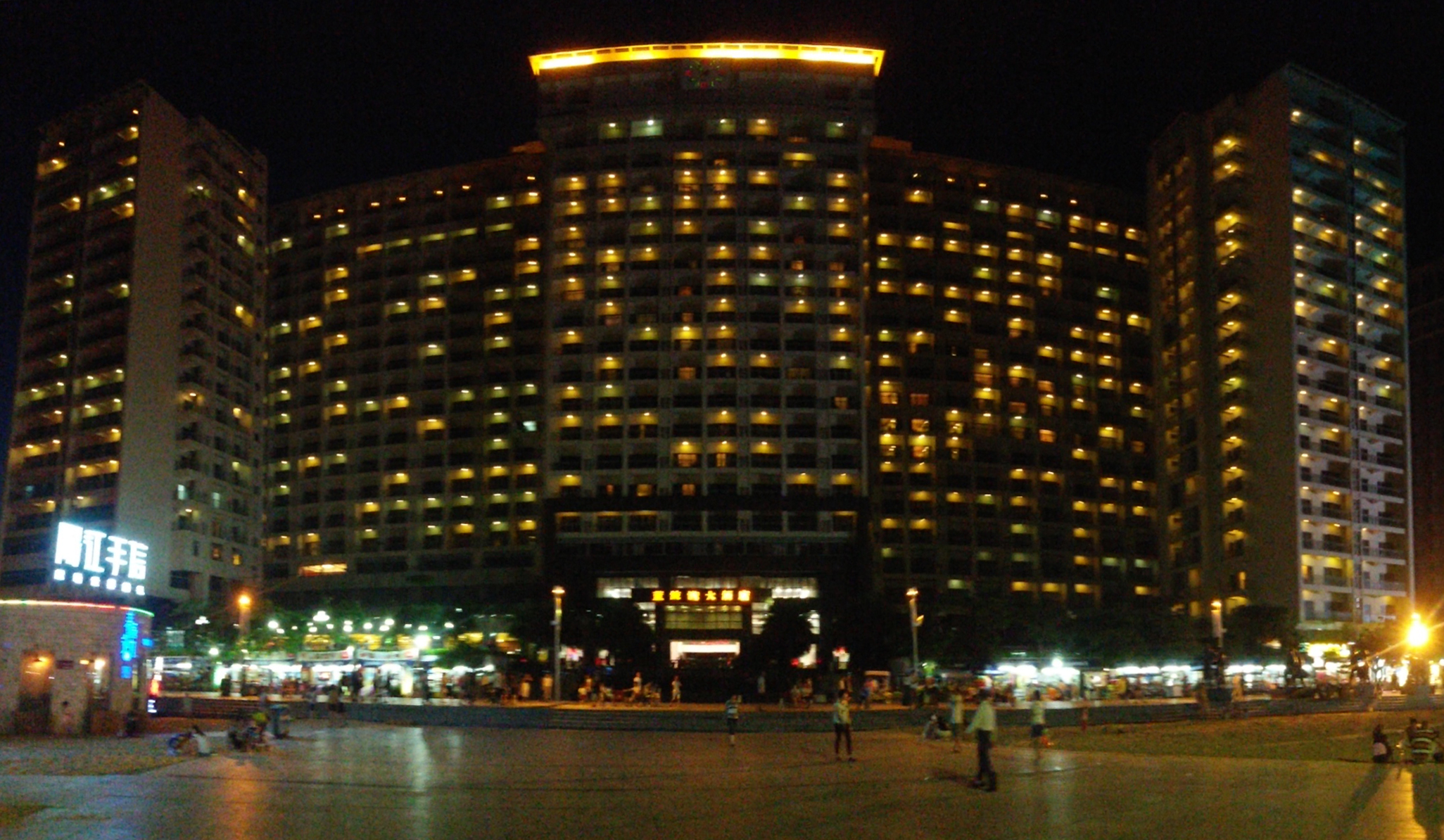 粵語: 藍波灣大酒店南門